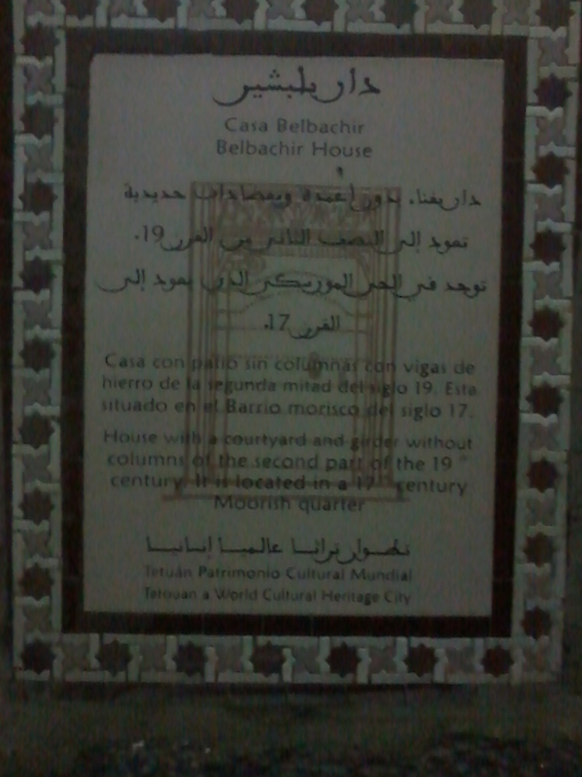 Placa en la Casa de Ahmed Belbachir Haskouri. Puesta en agosto 2012. Tetuan, Marruecos